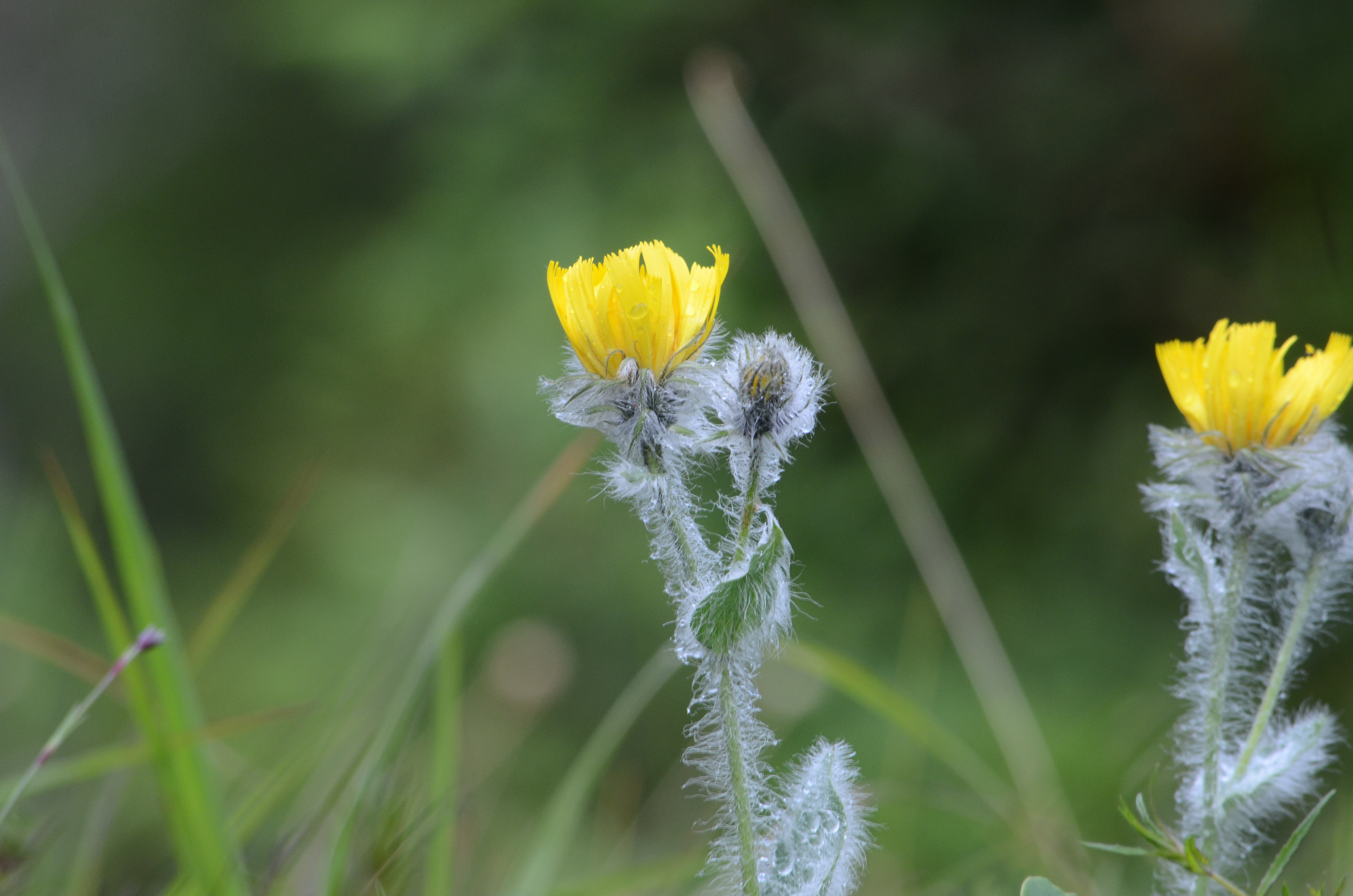 in Kärnten